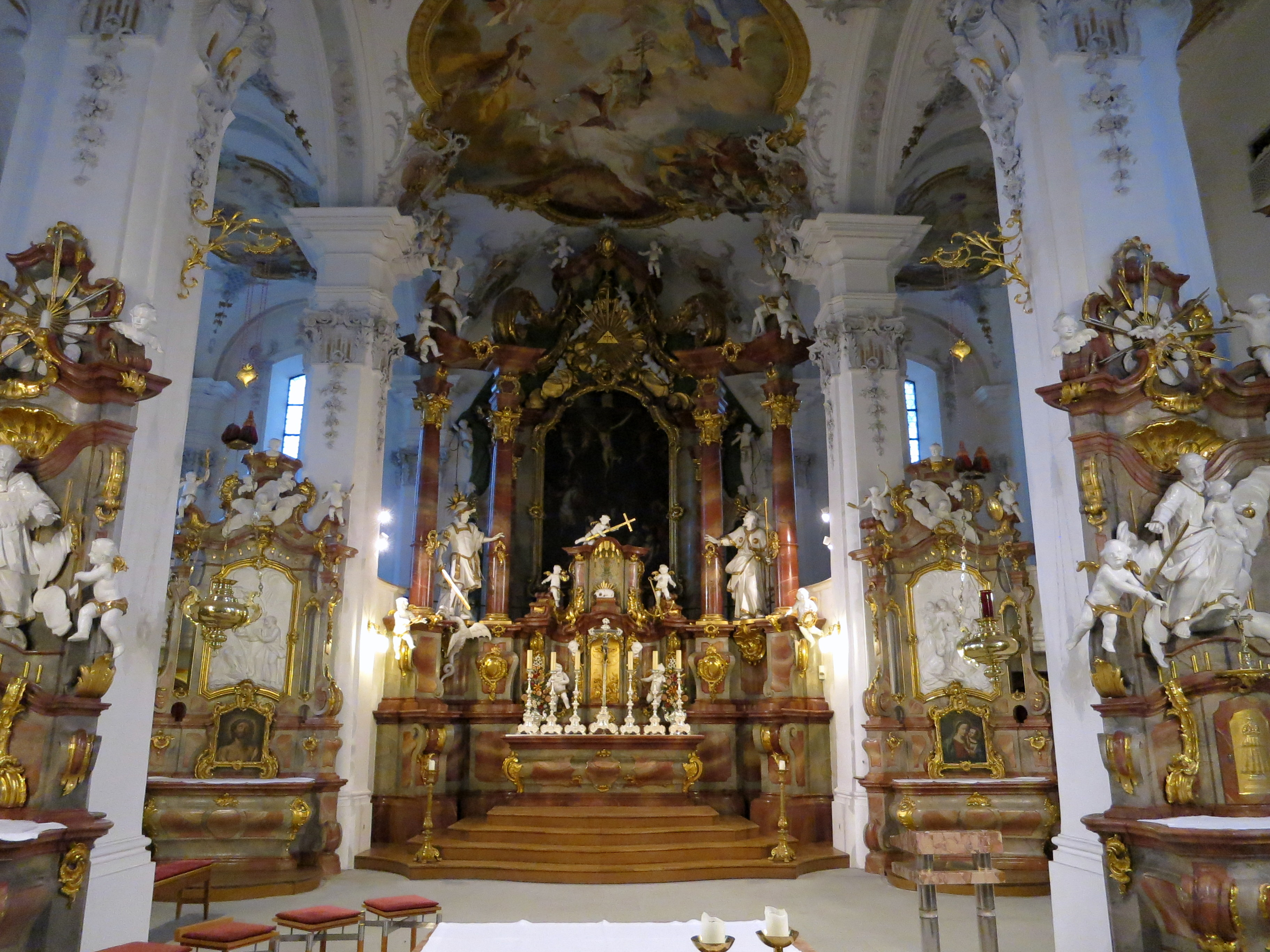 Der vorgetäuschte Chor